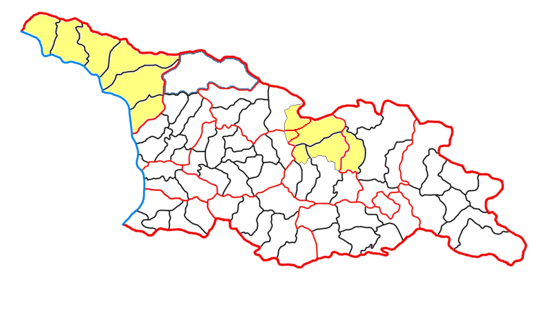 Южная Осетия и Абхазия на административной карте Грузии